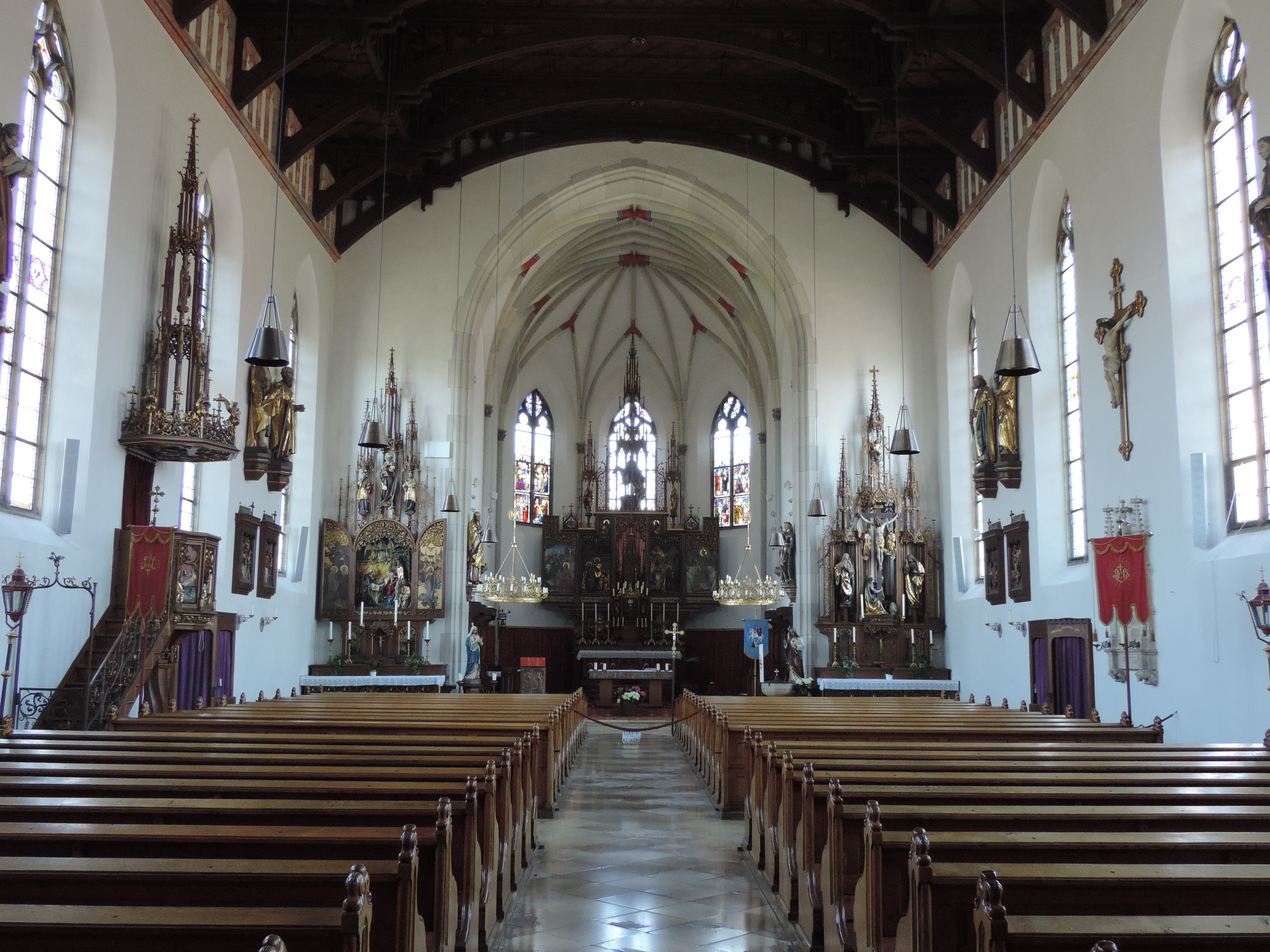 Pfarrkirche St. Martin in Aindling, Innenraum